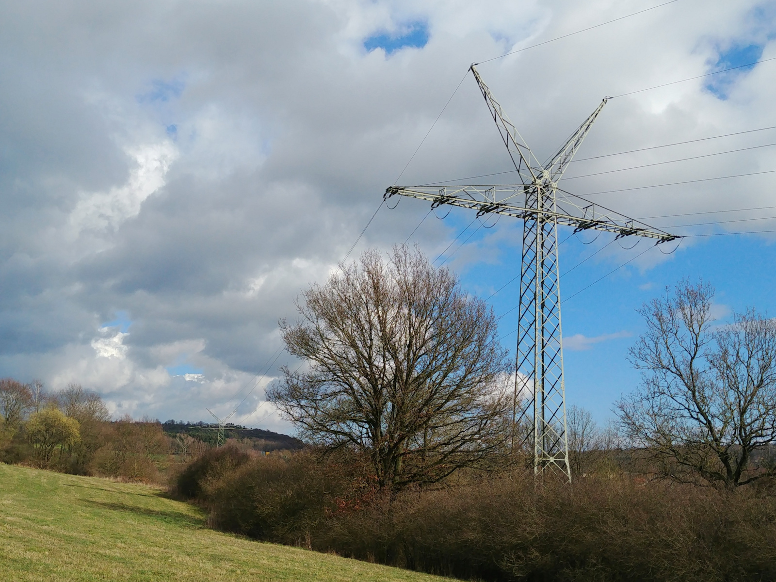 Einebenenmast mit Erdseilhörnern, 110-kV-Leitung in Merenberg, Hessen